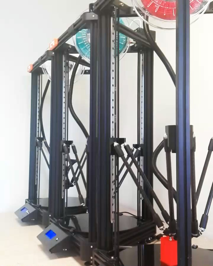 Fotografía del Taller Átomos